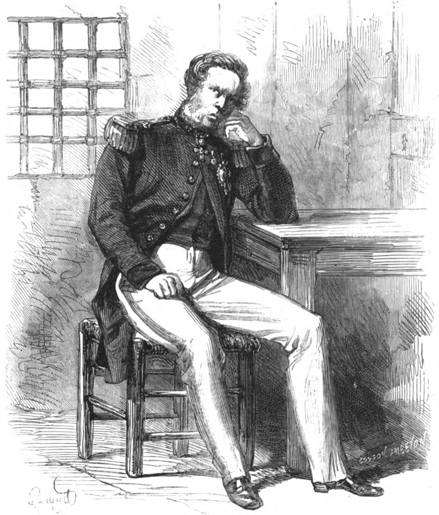 Le coronel F. Carneiro de Campos, président de la province brésilienne de Mato Grosso, et prisionnier du dictateur Lopez.